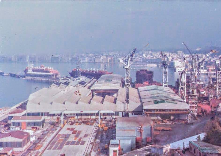 I cantieri navali di Castellammare di Stabia negli anni '70